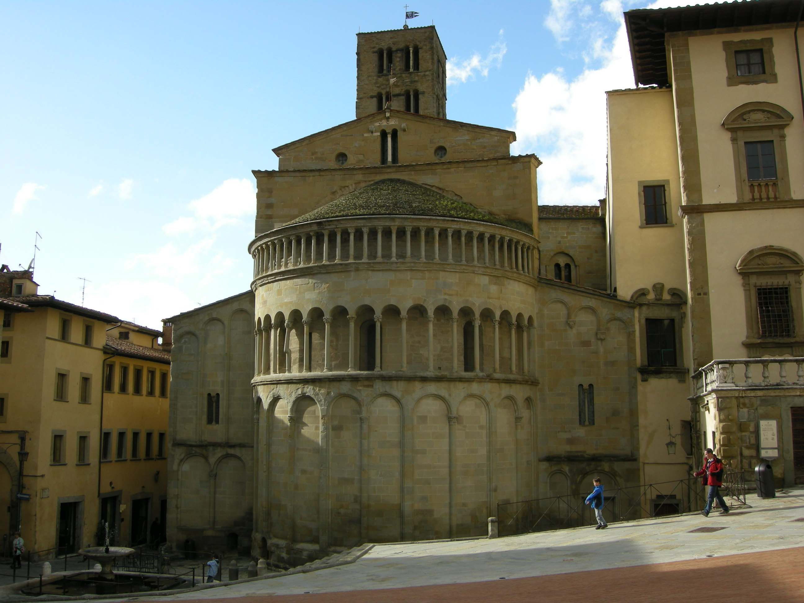 Arezzo, Santa Maria della Pieve